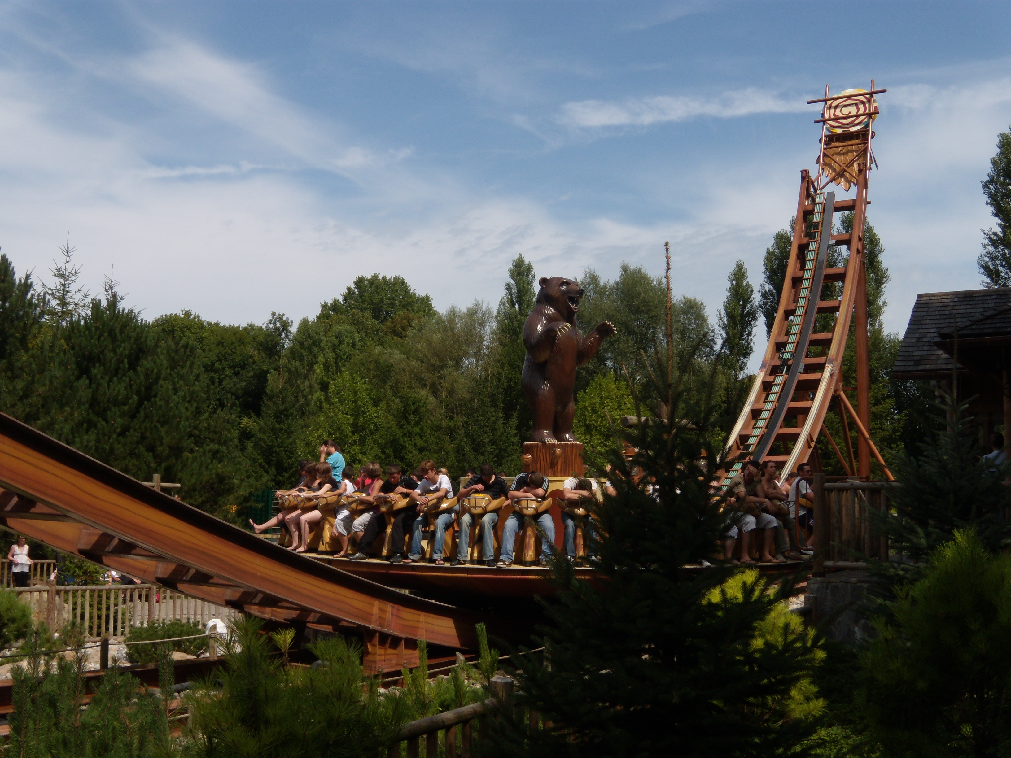 "Grizzly". Attractions de type Disk'O Coaster du parc d'attractions français Nigloland.